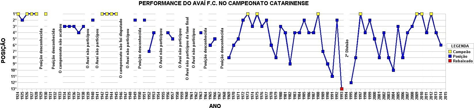 Performance do Avaí Futebol Clube no Campeonato Catarinense de Futebol ao longo dos anos de 1924 a 2008.